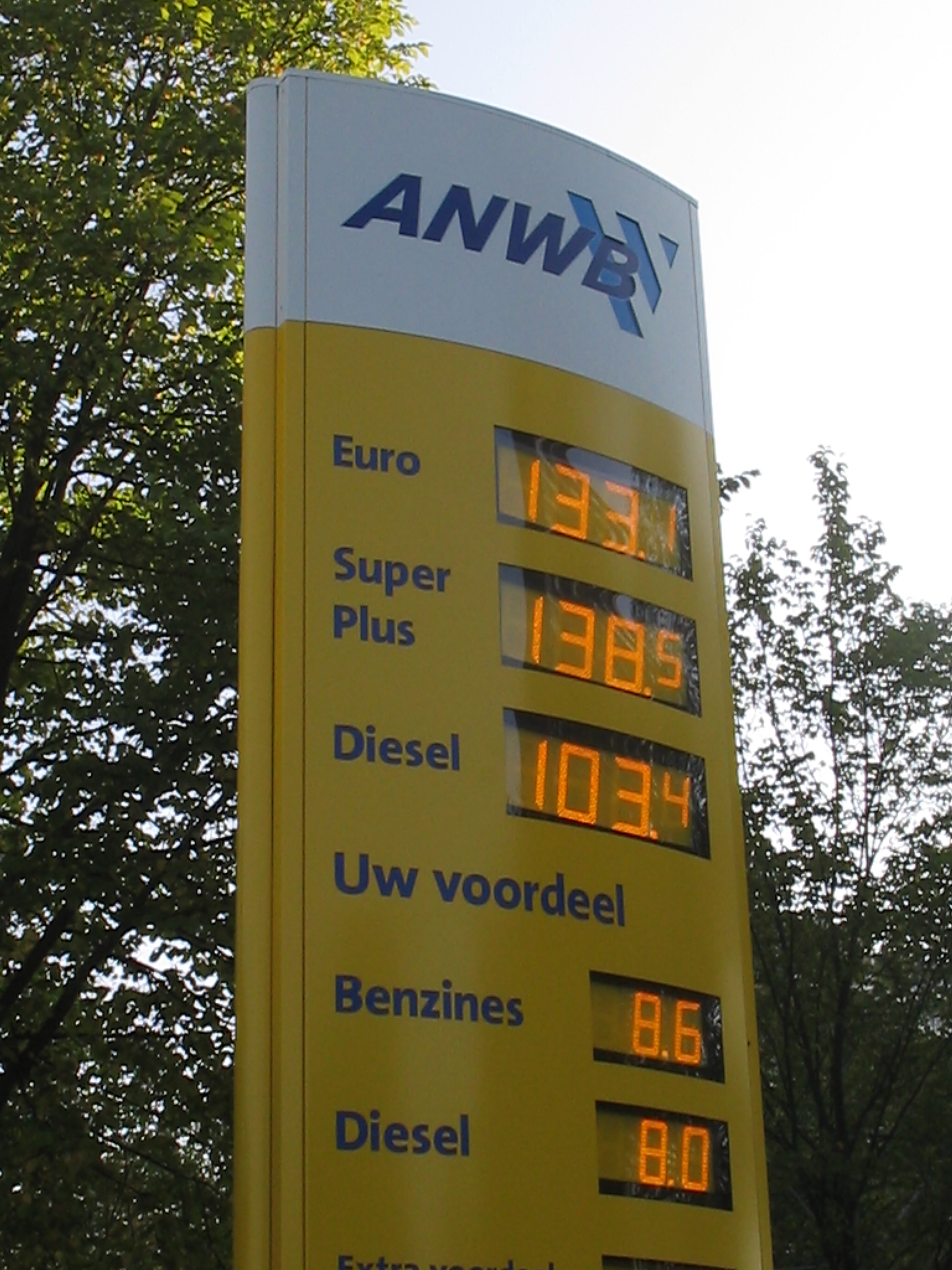 anwb tankstation in Delft,16 oktober 2005